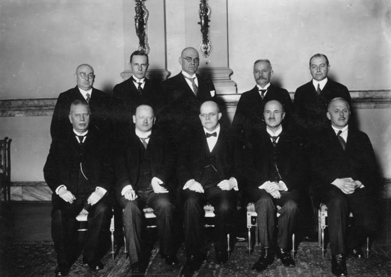 Gruppenaufnahme des neuen Cabinetts nach seiner ersten Sitzung unter dem Vorsitz des Reichskanzlers Dr. Marx im Reichskanzlerpalais Wilhelmstrasse. 1.2.27 v.r.n.l., sitzend: Wehrminister Dr. Gessler (ohne Partei), Justizminister und Vizekanzler Hergt (Dntl.), Reichskanzler und besetzte Gebiete Dr. Marx (Ztr.), Aussenminister Dr. Stresemann (D.V.P.), Arbeitsminister Dr. Brauns (Ztr.). v.r.n.l., stehend: Wirtschaftsminister Dr. Curtius (D.V.P.), Ernährungs-und Landwirtschaftsminister Schiele (Dntl.), Finanzminister Dr. Köhler (Ztr.), Innenminister Dr. von Keudell, Verkehrsminister Dr. h.c. Koch-Düsseldorf (Dntl.) Information added by Wikimedia users.Kabinett Marx IV 29. Januar 1927 – 29. Juni 1928